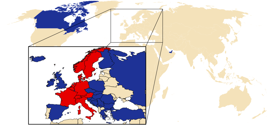 Intersport Karte der Länder ´Dec. 2016